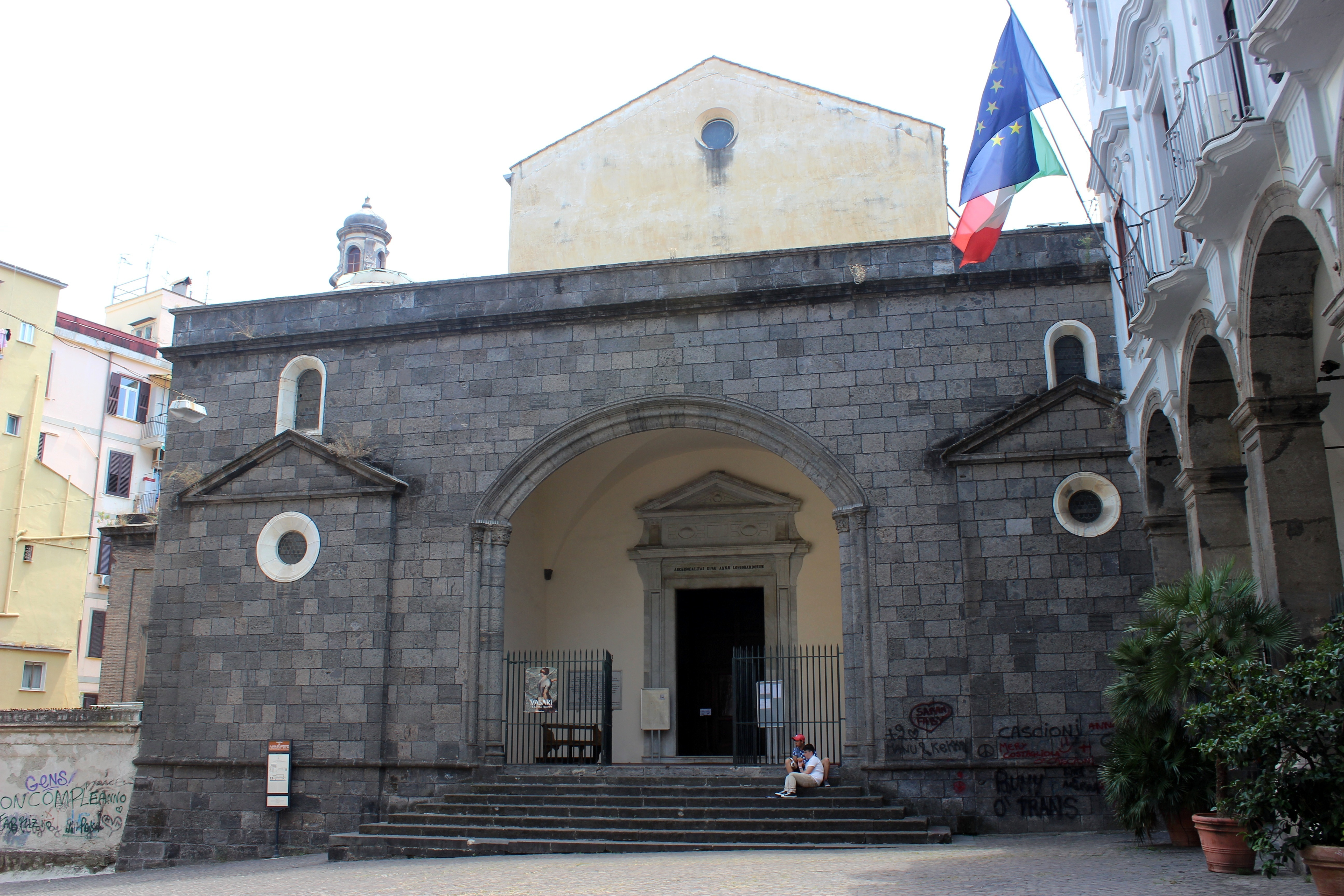 Nápoles. Sant'Anna dei Lombardi (Monteoliveto).